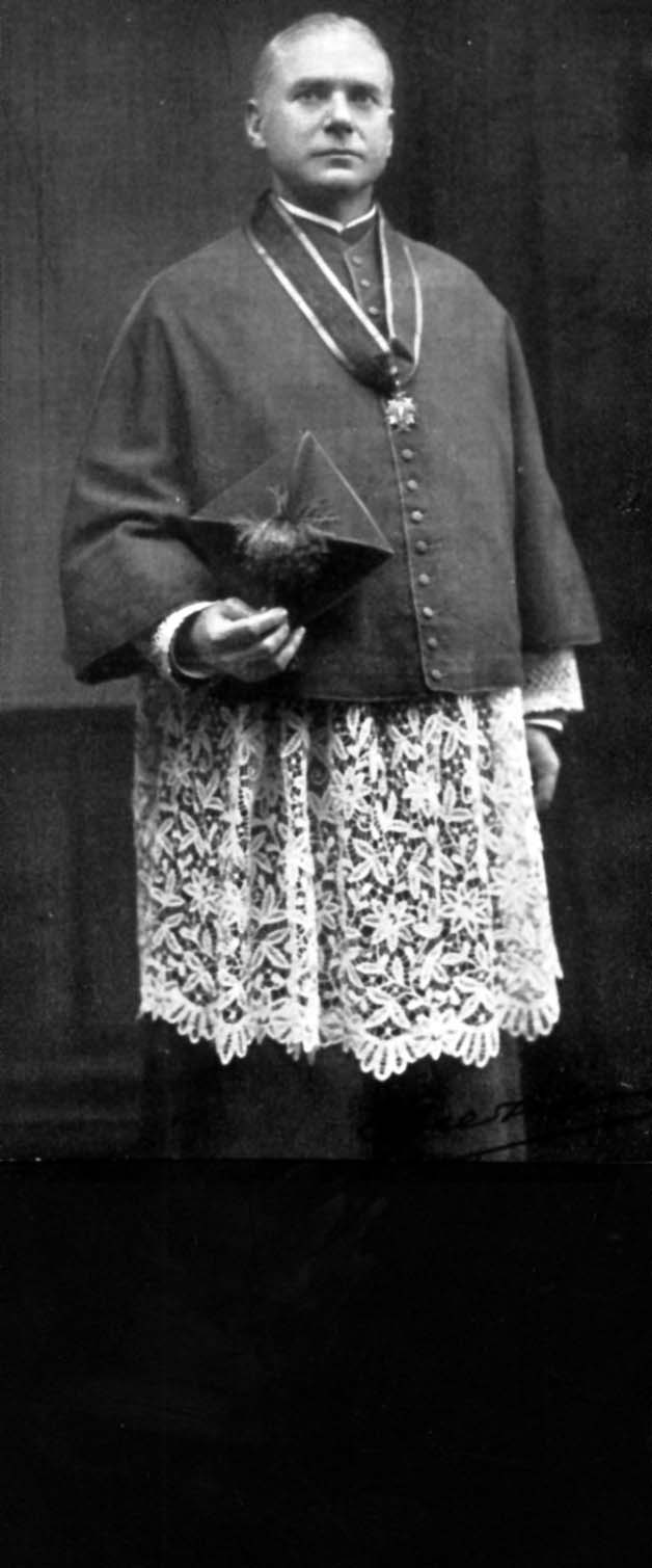 Msgr. August Brehm, Domdekan Speyer